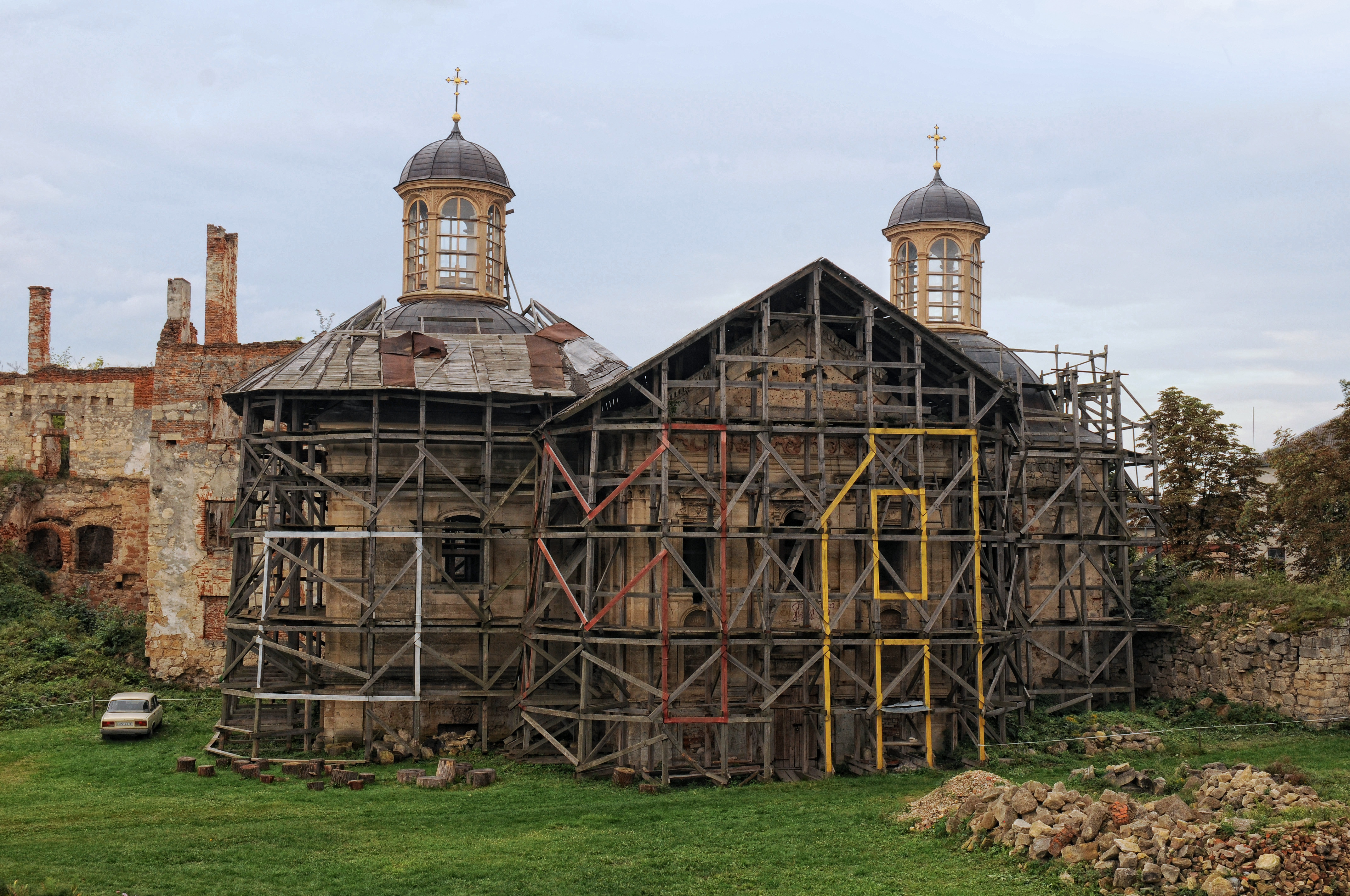 Бережани, замковий Троіцький костел